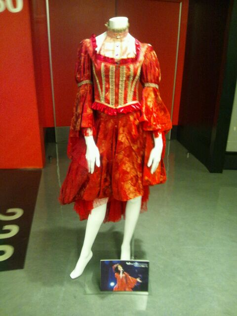 アニメロミックス Presents Minori Chihara Birthday Live 2012 supported by JOYSOUND 衣装展覧会より『Minori Chihara Live Tour 2012 〜D-Formation〜』、『Minori Chihara Live 2012 ULTRA-Formation/PARTY-Formation』の衣装。